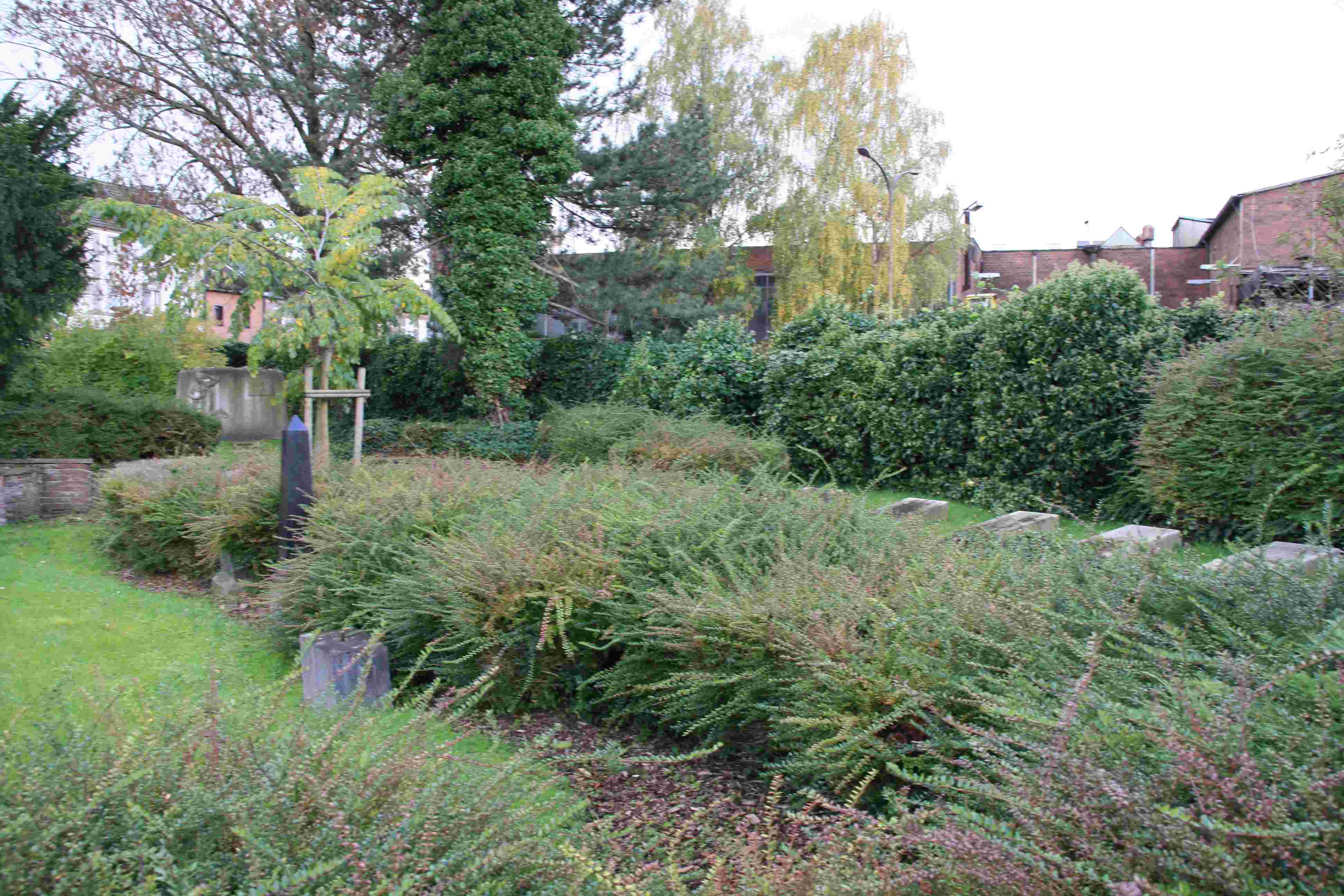 Jüdischer Friedhof Eschweiler 02